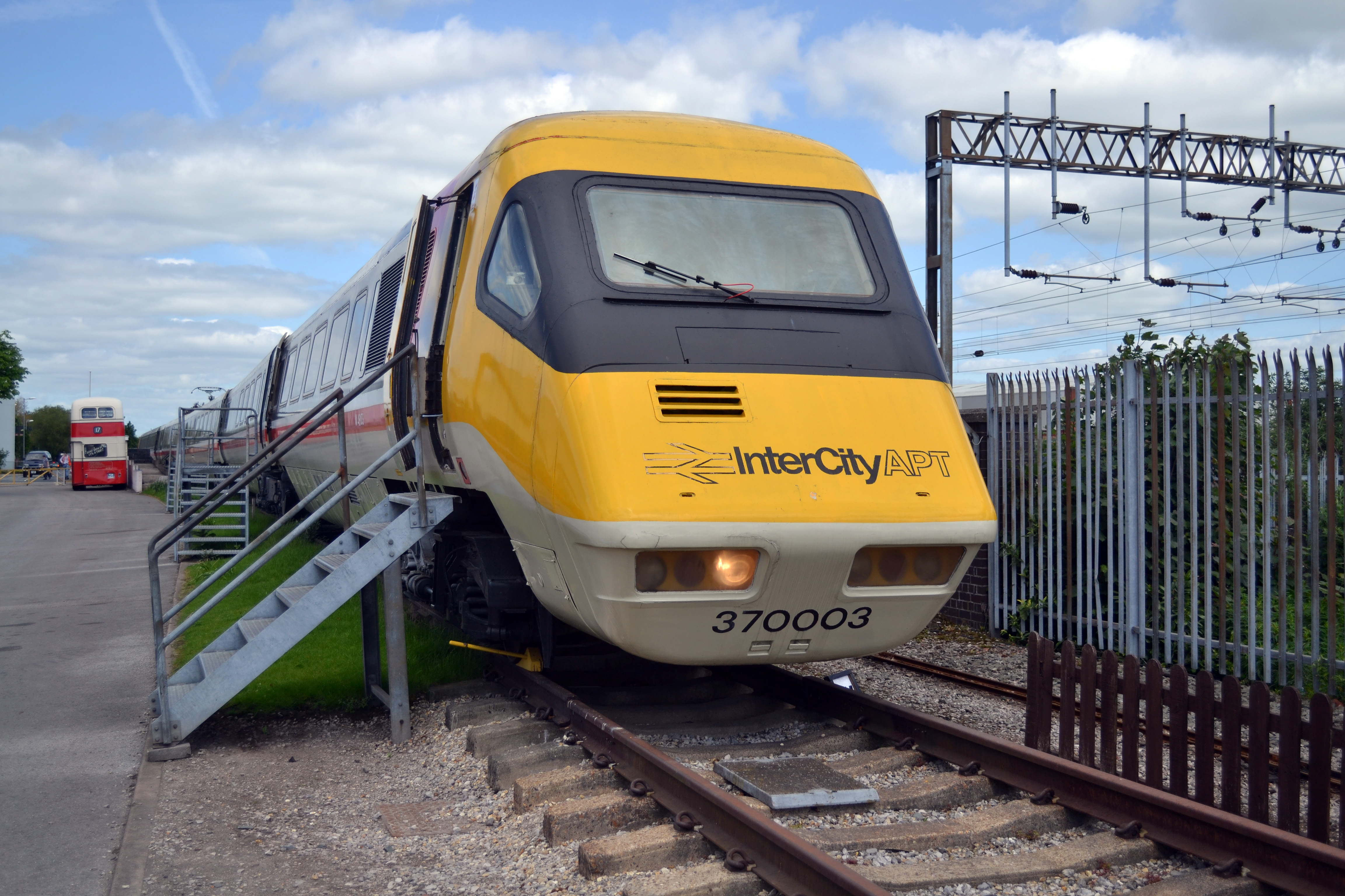 APT